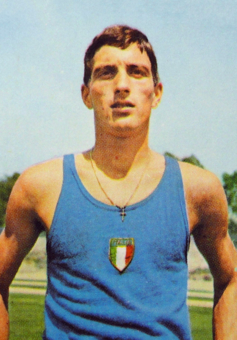 CAMPIONI DELLO SPORT 1969/70-n.91-VISINI (ITA)-ATLETICA LEGG.